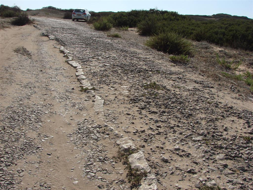 דרך סולינג לייד גבעת אולגה